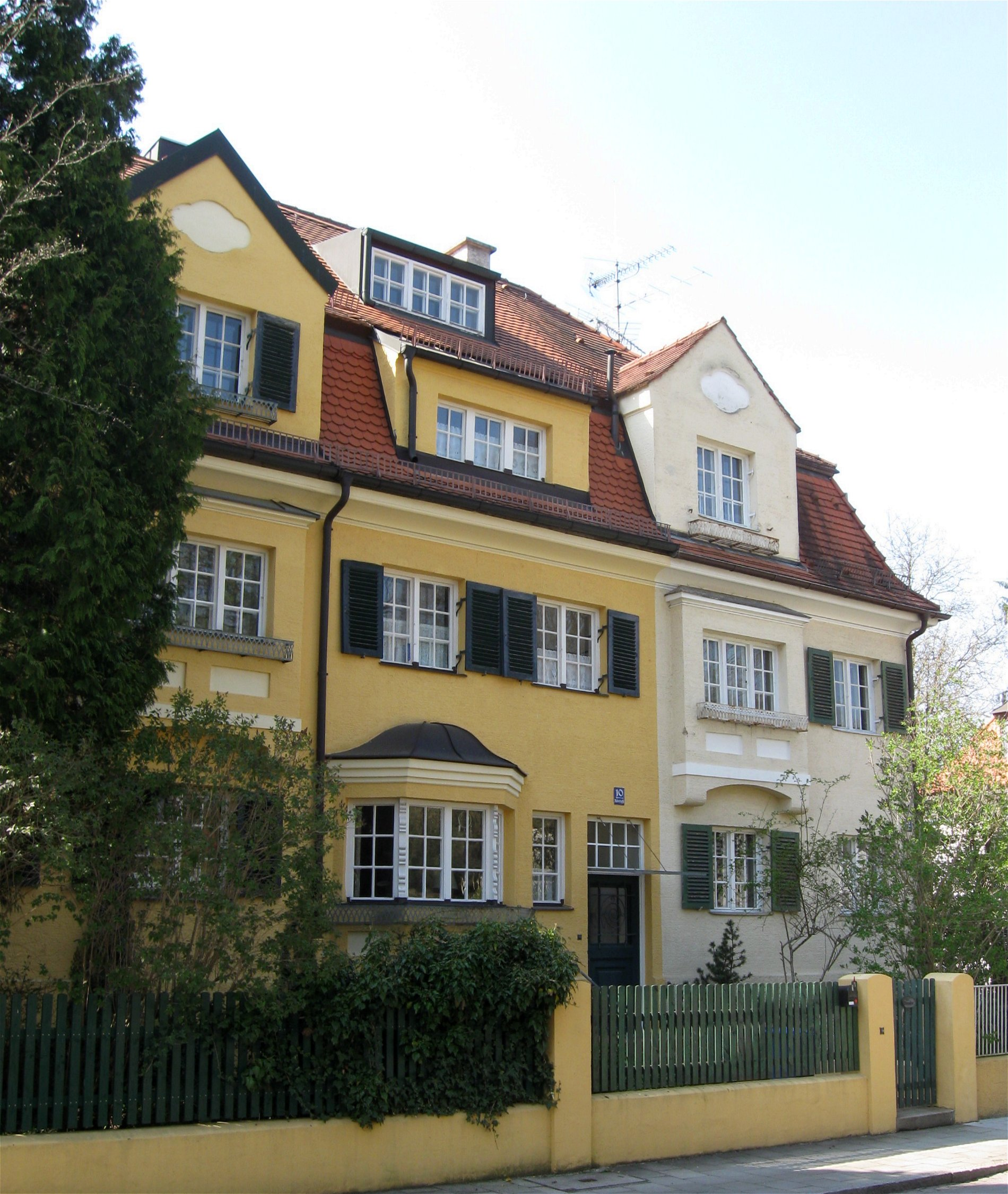 München, Rabenkopfstraße 8, 10, 12; Stattlicher zweigeschossiger Mansarddachbau, bestehend aus drei Einfamilienhäusern, durch Erker und Dachausbau annähernd symmetrisch gegliedert, 1912 durch Eduard Baumann als Architekt und Bauherr.